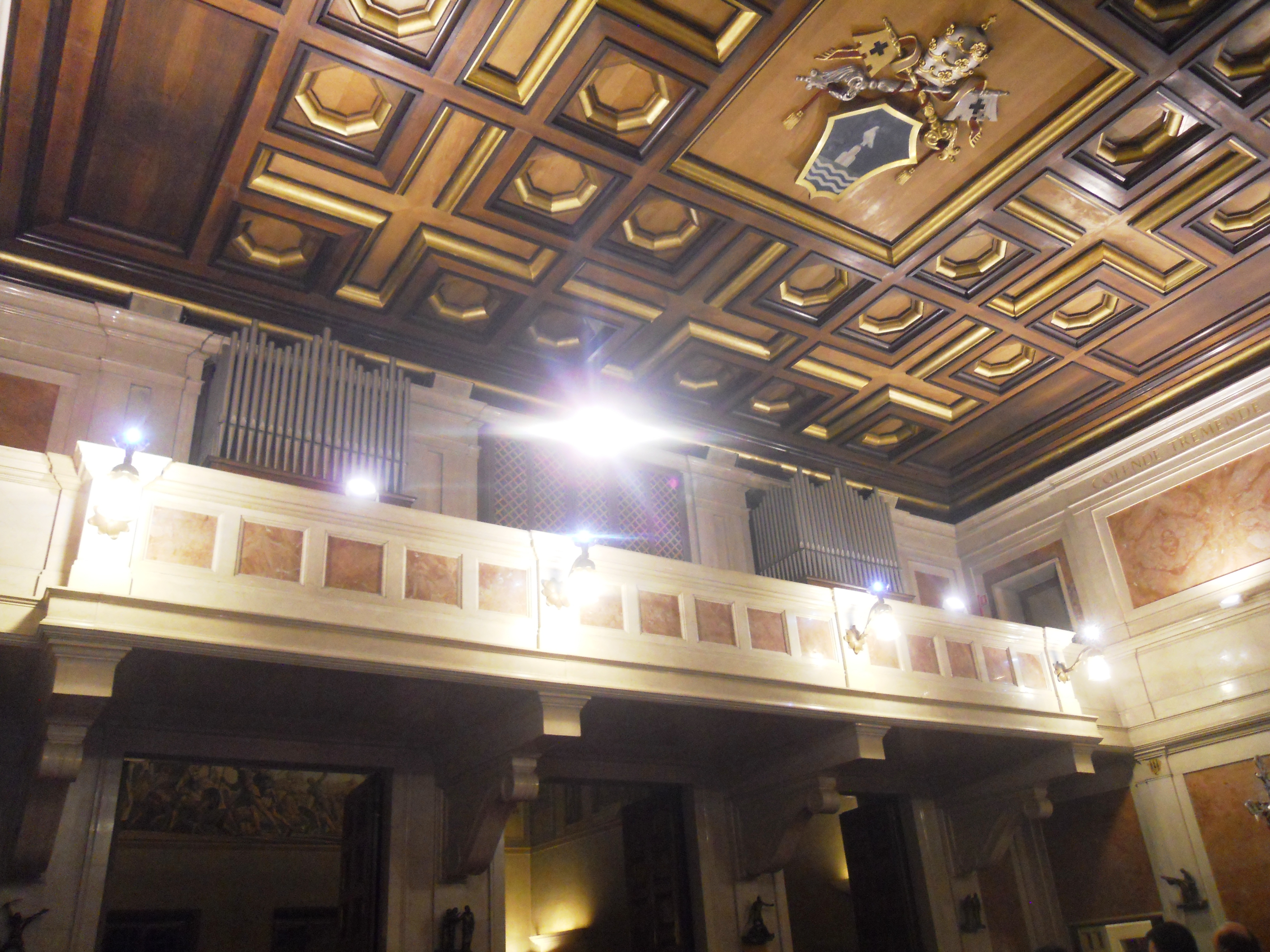 La controfacciata della cappella di Sant'Agnese nell'Almo Collegio Capranica, con l'organo Mascioni opus 696